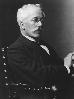 Gustav Droysen (Wikidata)